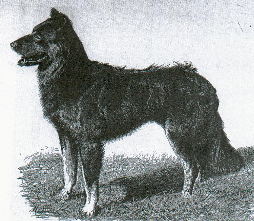 Photo d'un Berger de Beauce publiée en 1897 dans "Les races de chiens" du comte Henri de Bylandt